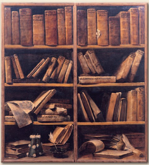 Trompe l'oeil che rappresenta le ante di una libreria appartenuta a Padre Giambattista Martini (sinistra cm. 165,5x78; destra cm. 165,5x75,5). Museo internazionale e biblioteca della musica di Bologna.